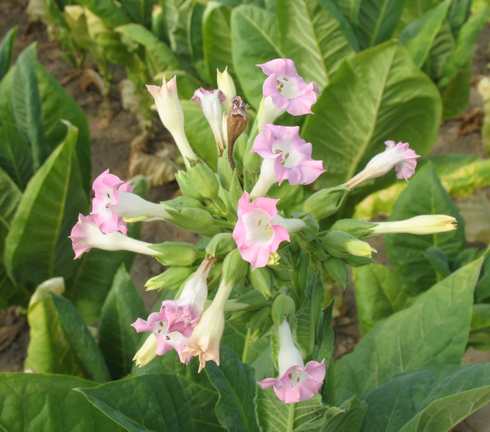 Bildbescheibung: Tabakblüte (Virginia-Sorte)